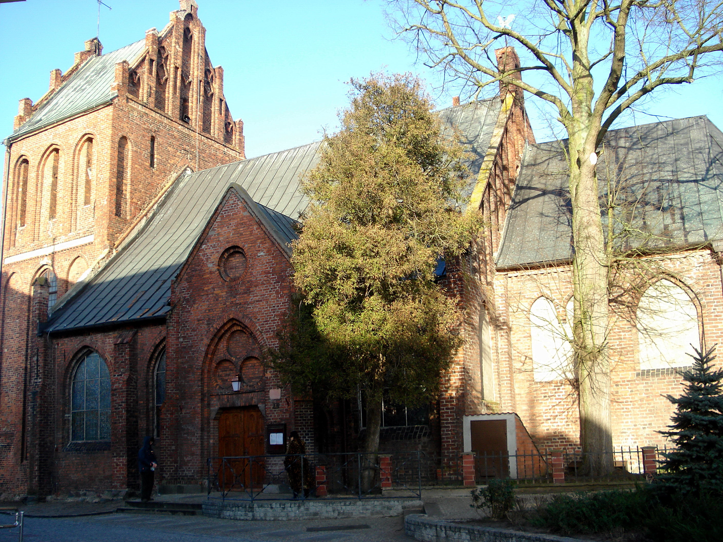 Karlino, kościół elewacja południowa, autor zdjęcia StaraWiedzma, 11.03.2007 r.